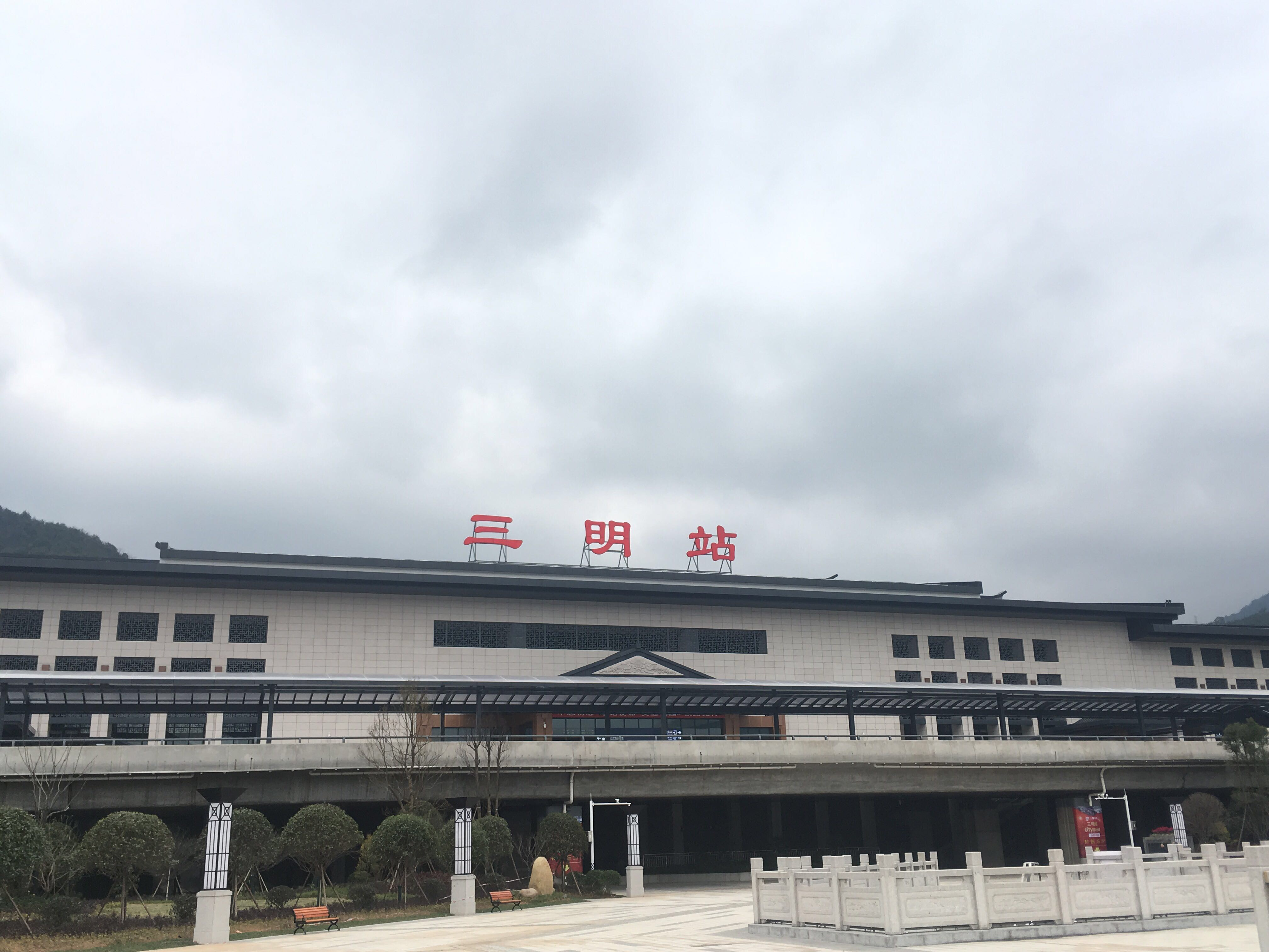 三明站，摄于2019年1月。